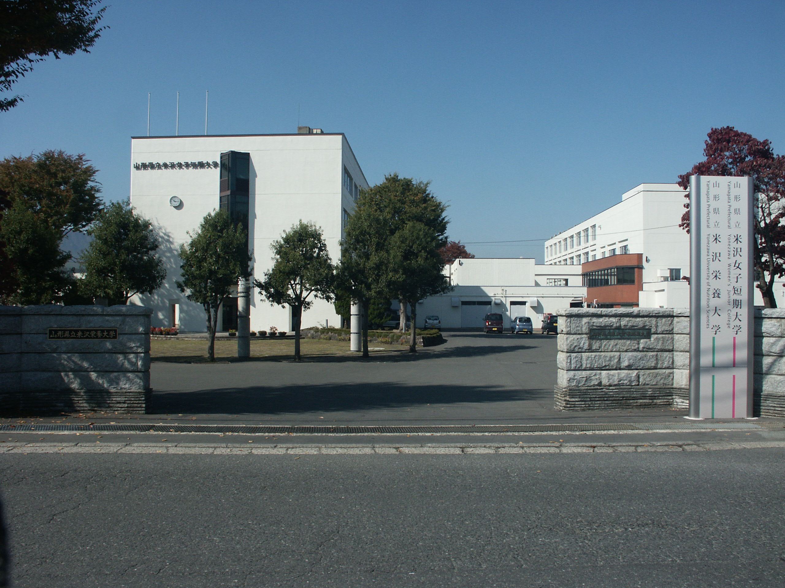 山形県立米沢女子短期大学、山形県立米沢栄養大学正門付近